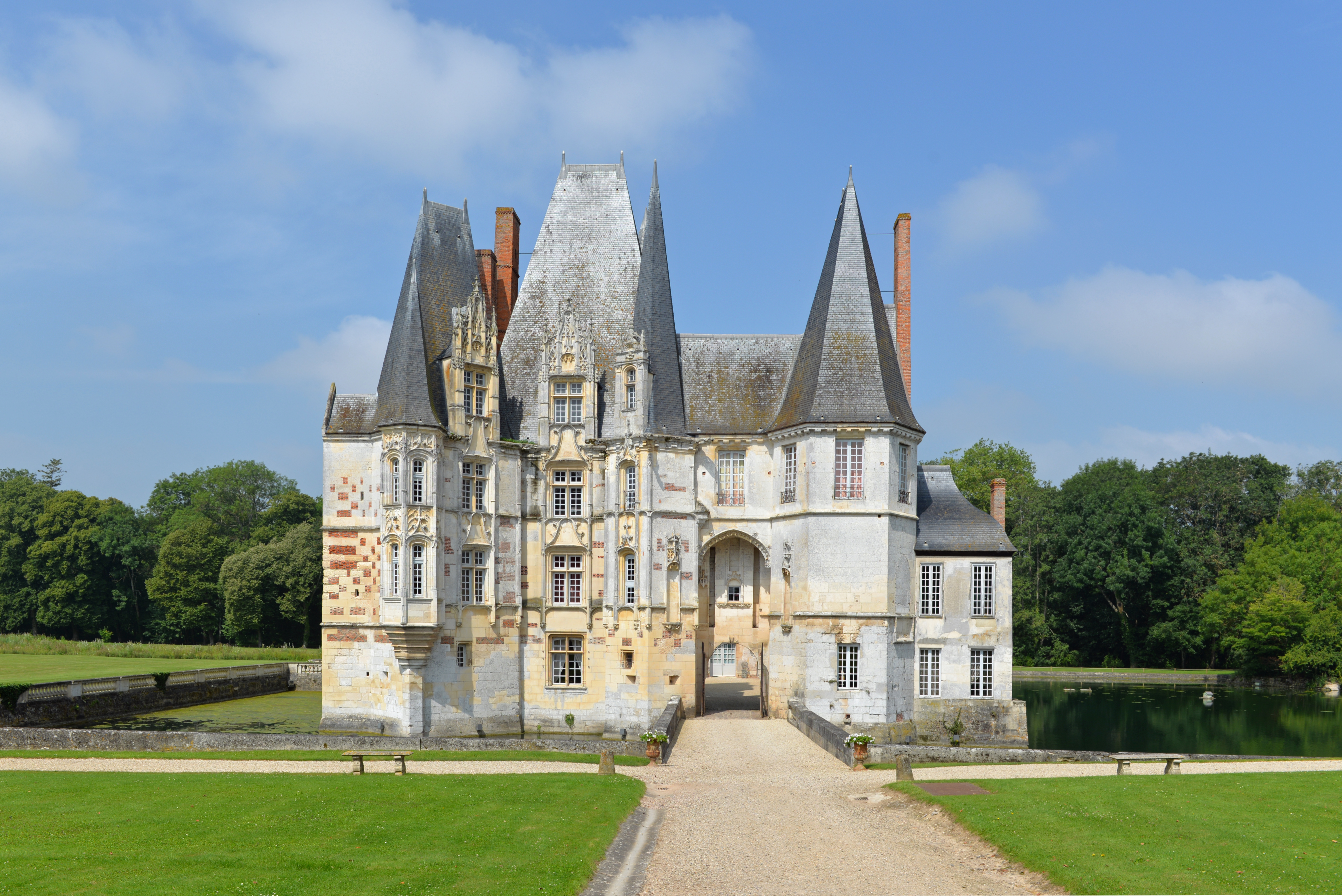 Château d'Ô, Mortrée, Orne, 2014 .